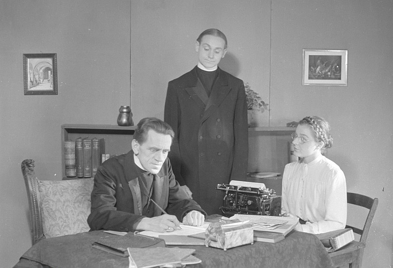 Original image description from the Deutsche Fotothek Szenenbilder